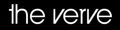 Bandlogo von 1997-1999